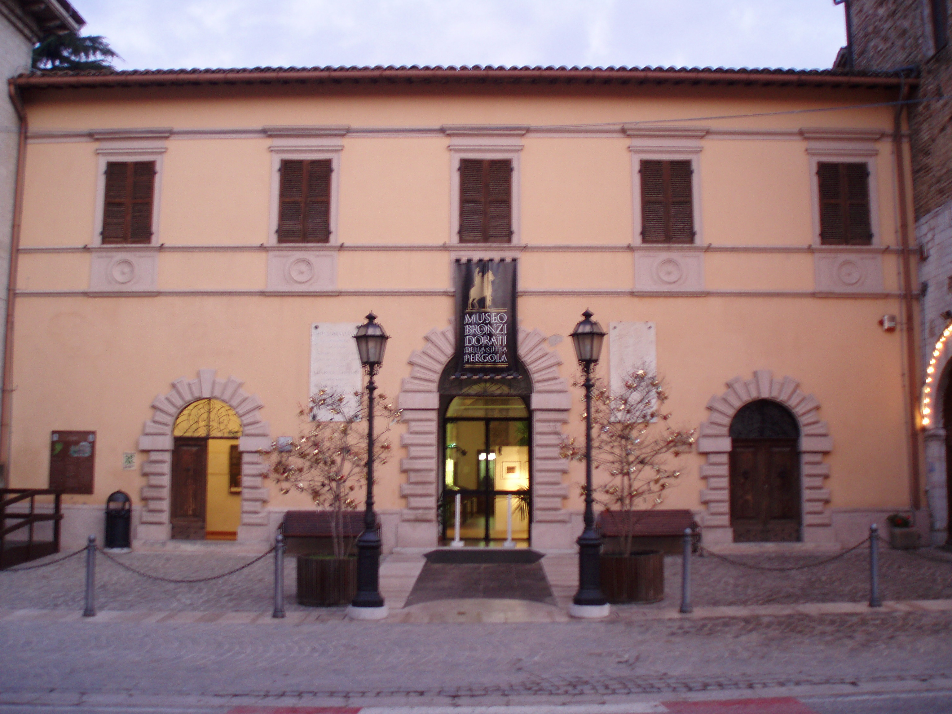 Museo dei Bronzi dorati e della città di Pergola - Ingresso